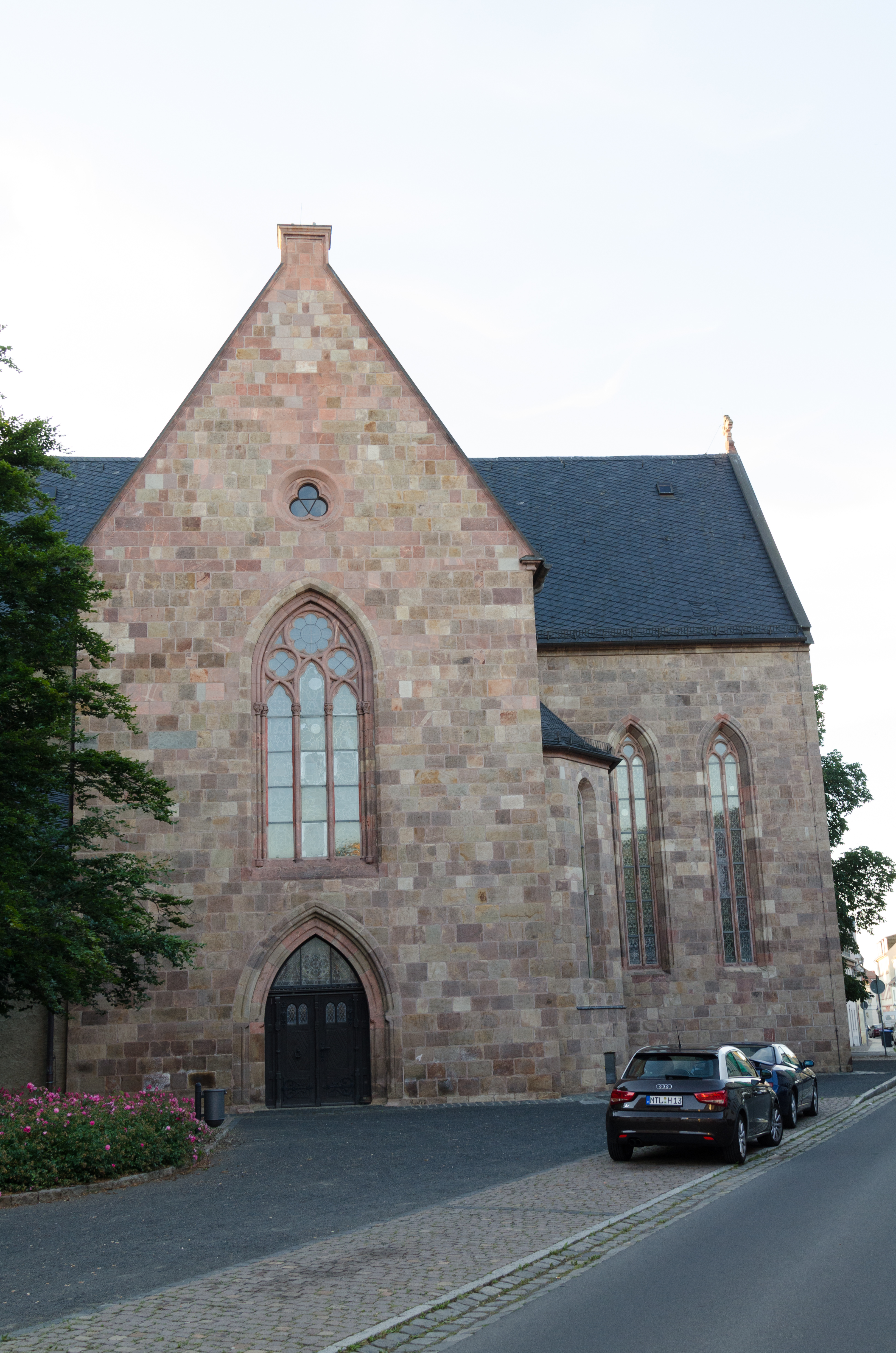 Grimma, Frauenkirchhof, Frauenkirche